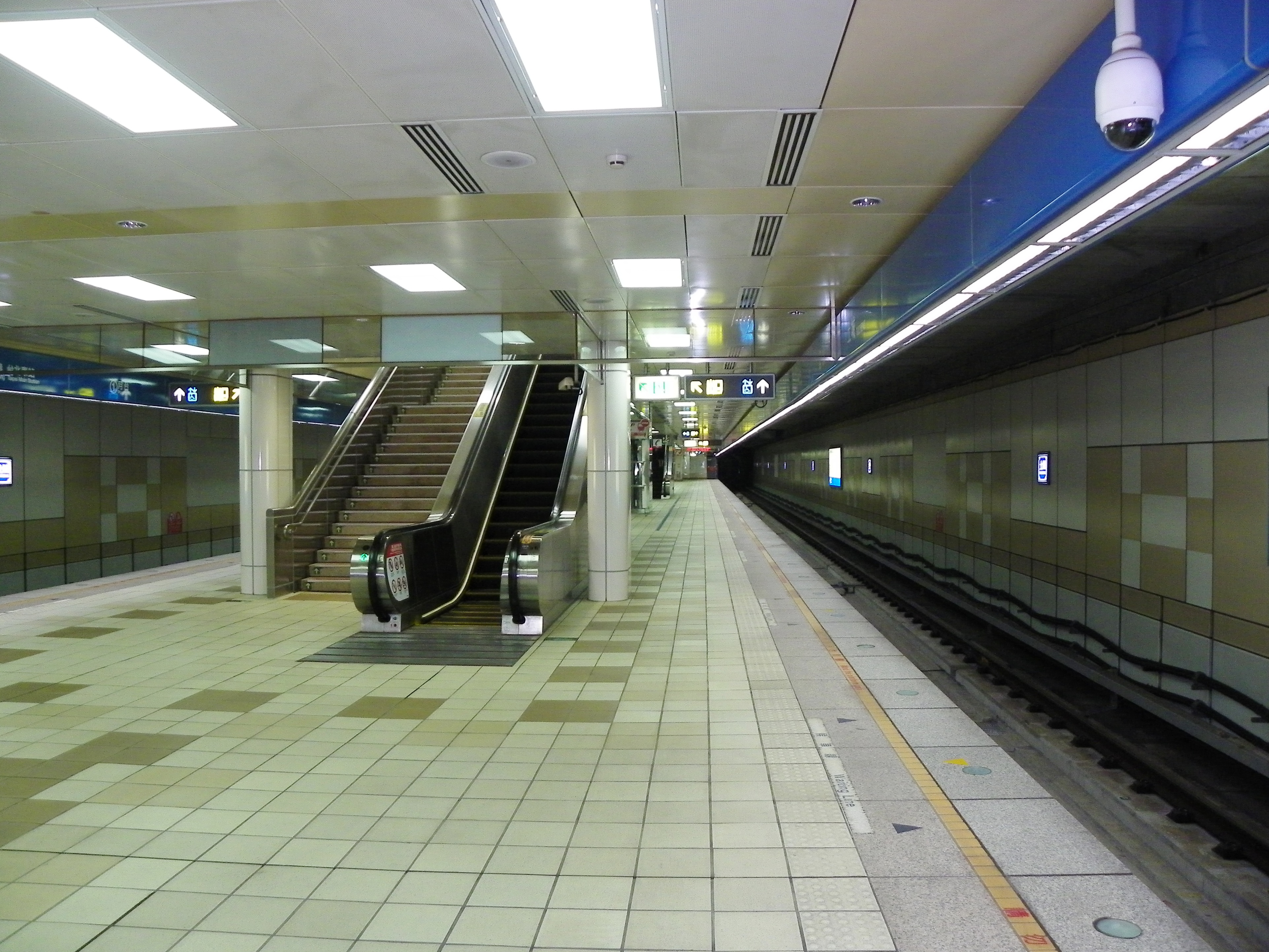 台北捷運土城線土城駅ホーム。